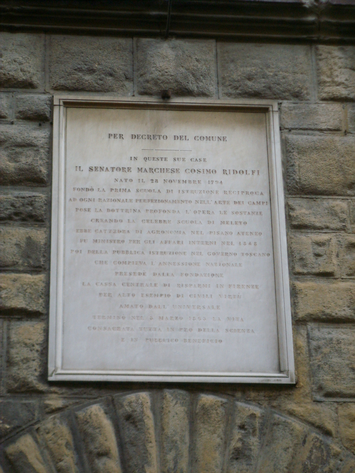 Palazzo di cosimo ridolfi, targa cosimo ridolfi